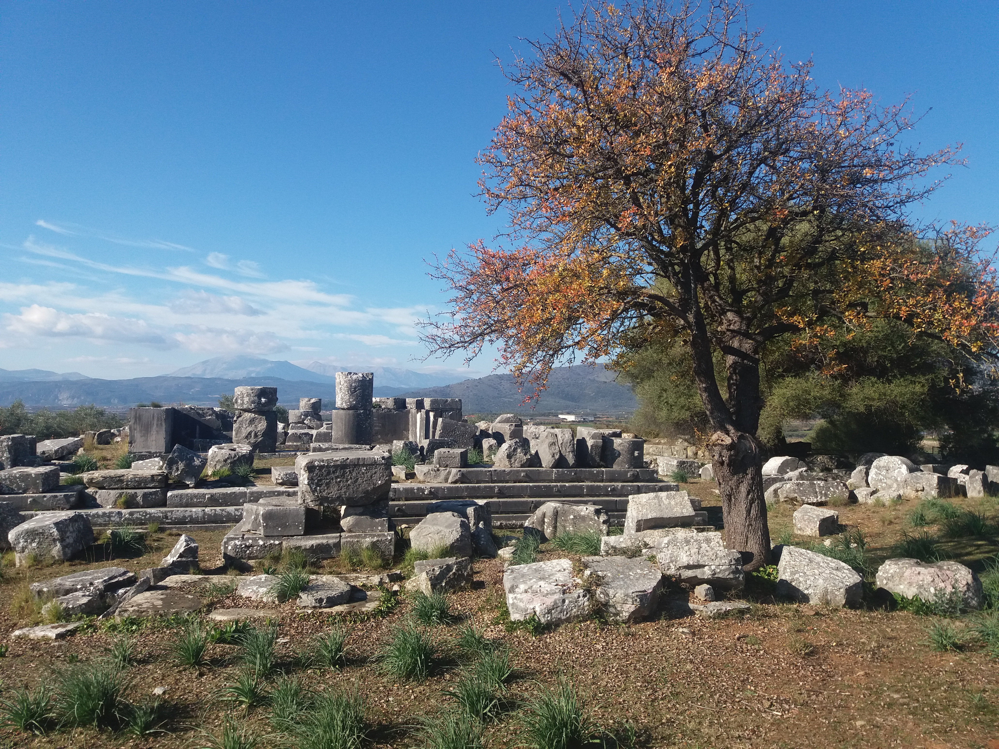 Ναός Στρατίου Διός«Ναός Στρατίου Διός»